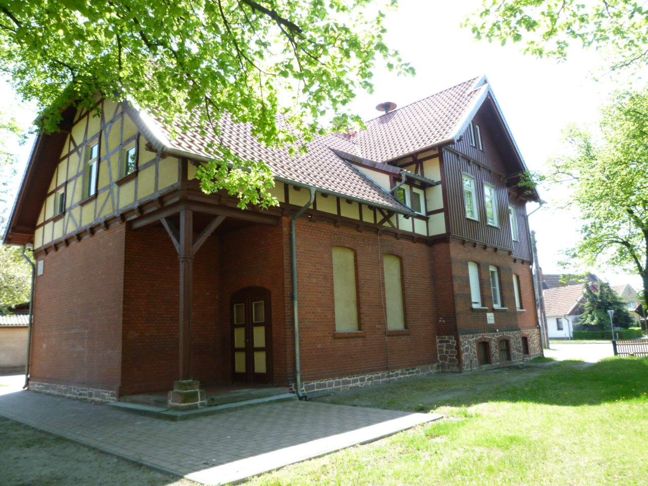 Das Berenbrocker Gemeinschaftshaus, ehemalige Ortsschule und Gemeindeverwaltung, nach der Eingliederung nach Calvörde fungiert es heute als Dorfgemeinschaftshaus, Aufnahme 02. Mai 2012